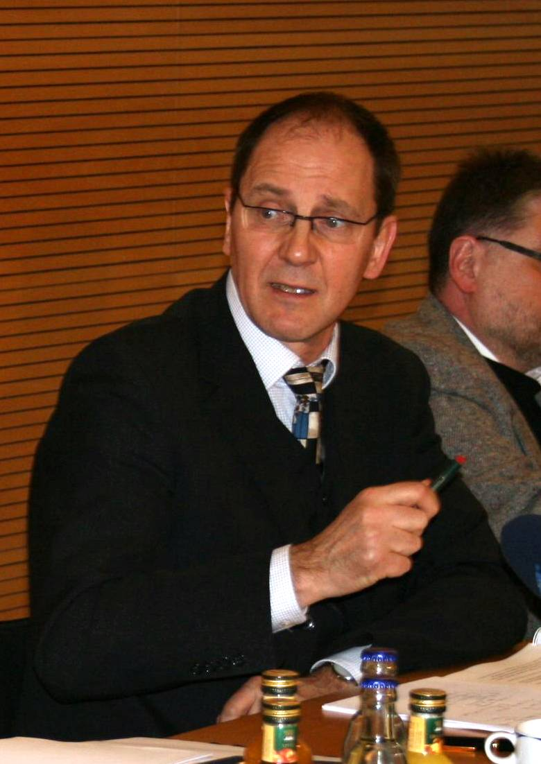 Sozialministerin Christine Lieberknecht, Kultusminister Bernward Müller, Prof. Michael Opielka und Prof. Michael Winkler bei der Vorstellung des Gutachtens